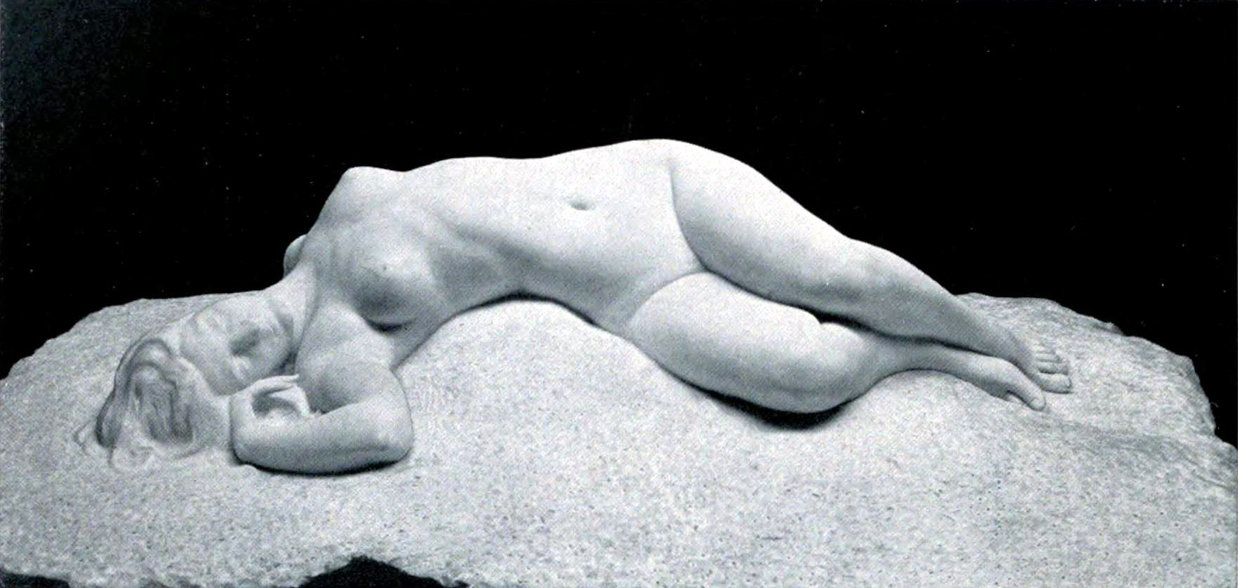 Nu féminin allongé